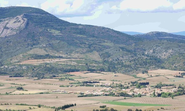 Camplong d'aude vue des"cote de camplong"